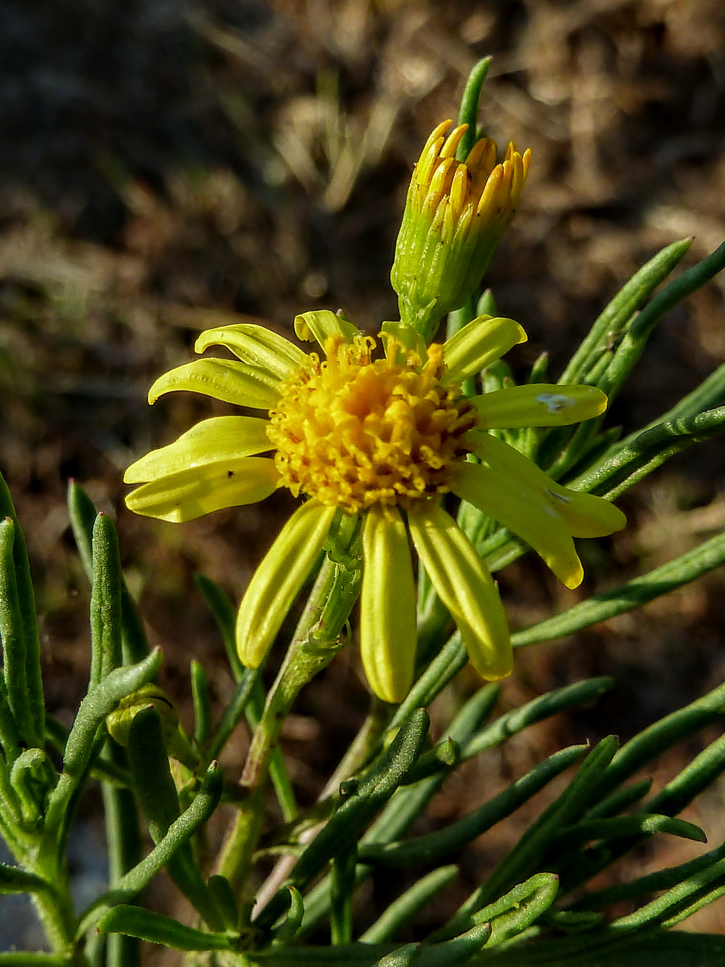 Senecio nevadensis subsp. malacitanus (Azuzón real, suzón de romero) - Flores en antesis e incipiente. Noten las hojas lineales de bordes revolutos. - Camino de La Murada, Albatera (Provincia de Alicante), España.